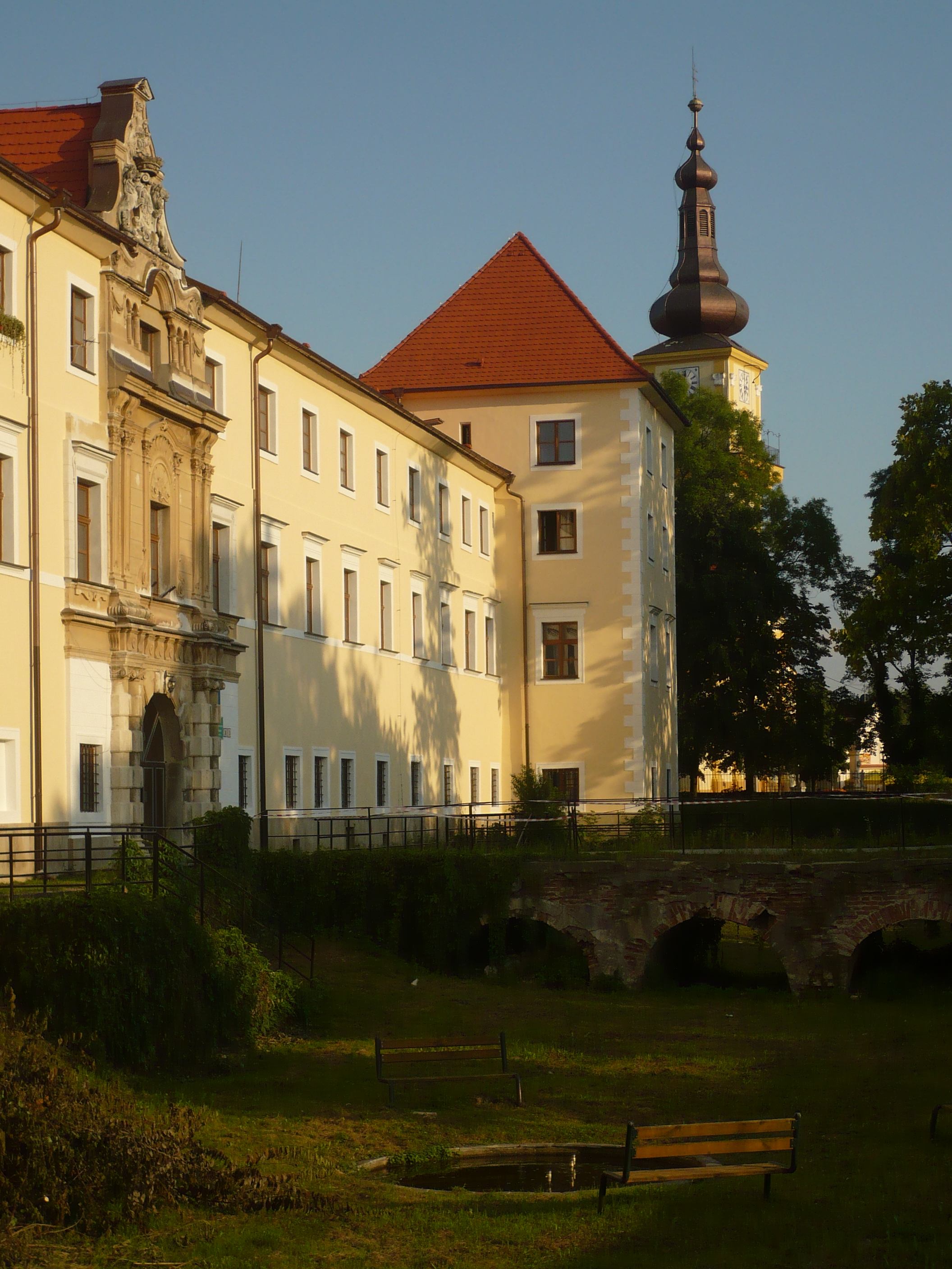 Scfloss Stampfen